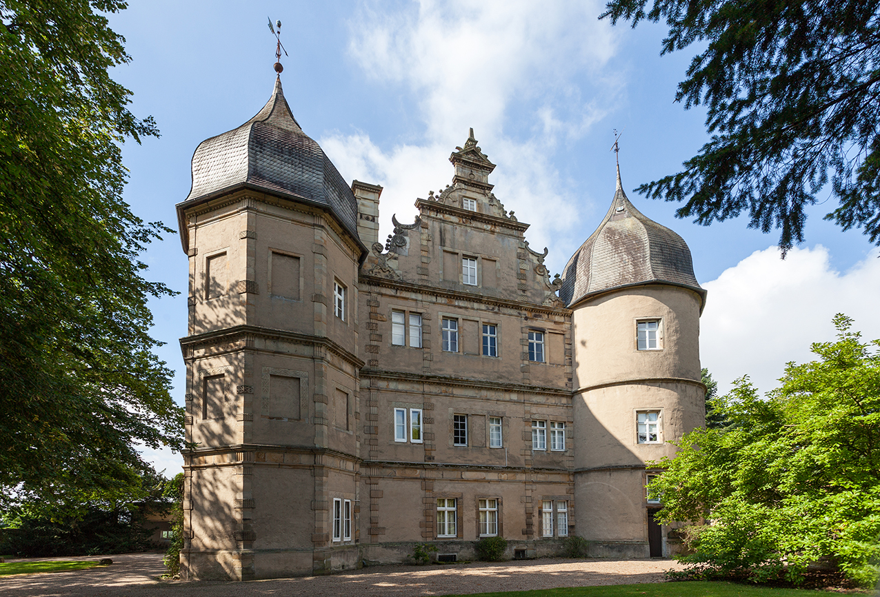 Schloss Barntrup (Kerssenbrocksches Schloss), Ostseite, Kreis Lippe This is a photograph of an architectural monument.